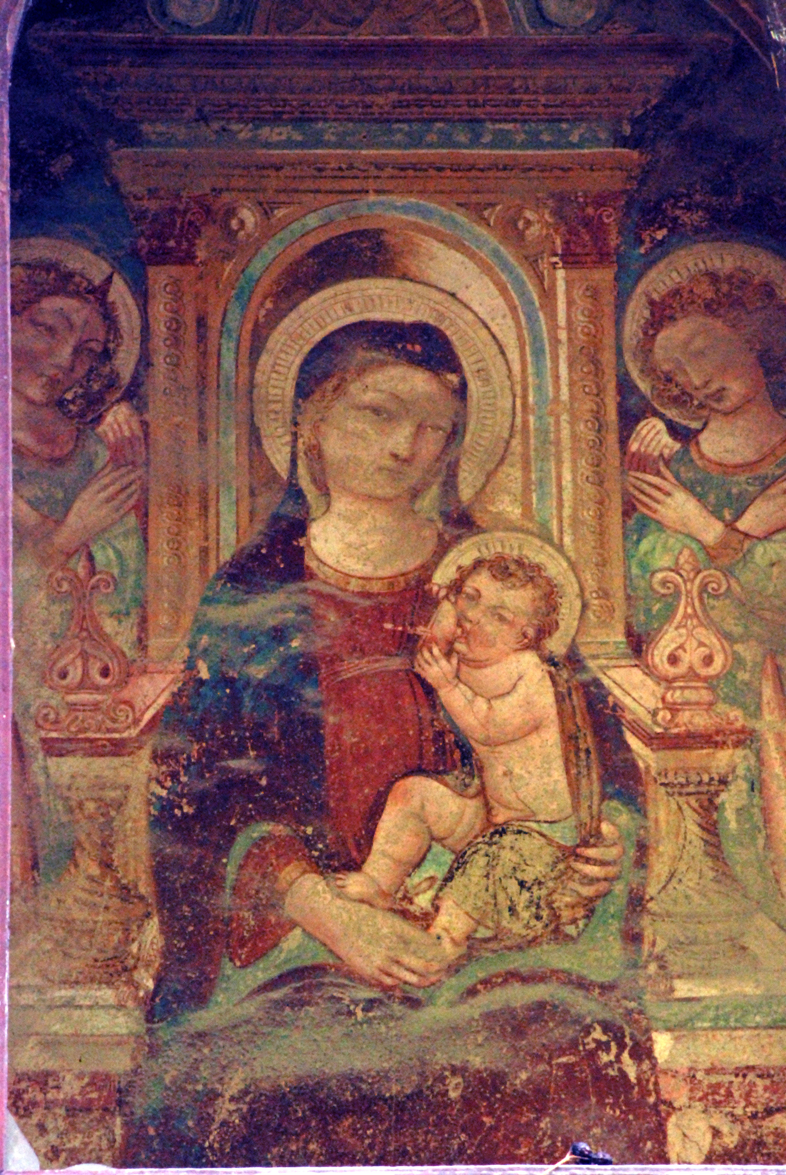 Affresco del Tabernacolo (cioè cappella) di Castelbonsi (San Casciano Val di Pesa) attribuito al Maestro di Signa.